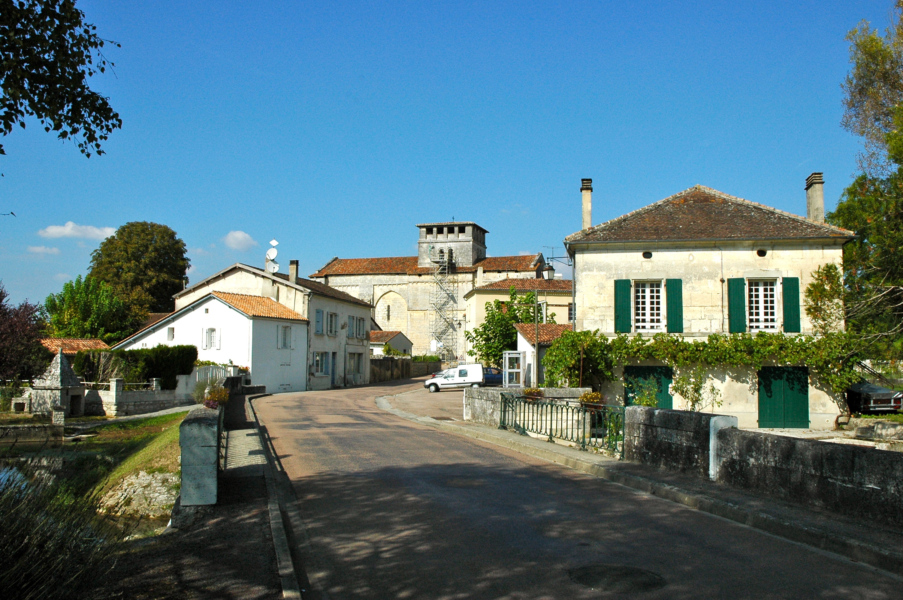 Entrée du village avant le pont sur la Belle avec ancien moulin à eau à droite et fontaine couverte à gauche